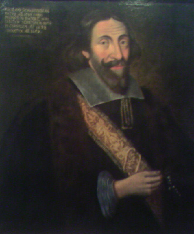 Foto eines Gemäldes, welches Nicolaus Scharffenberg darstellt